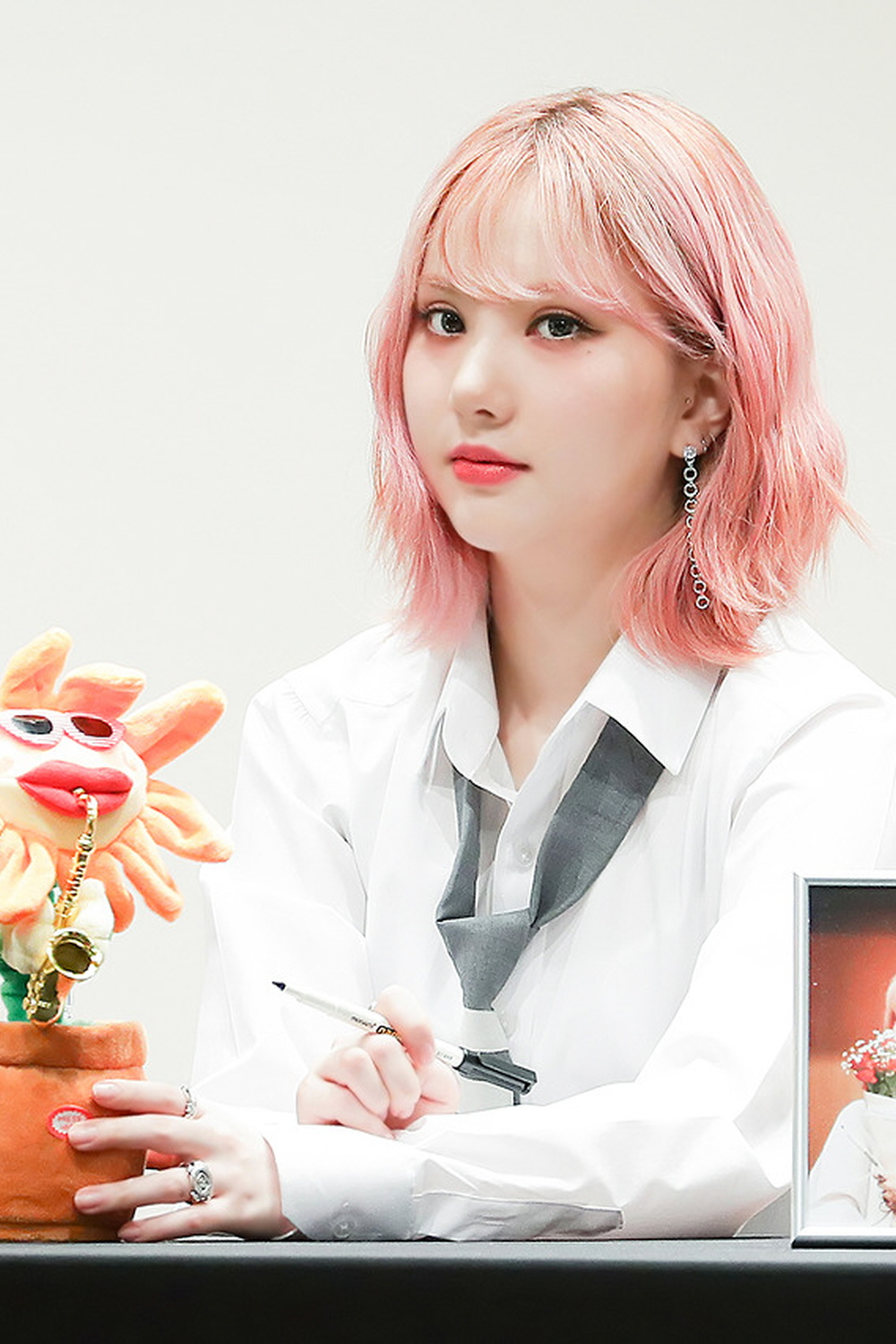 200216 상암 팬사인회 은하 (2)